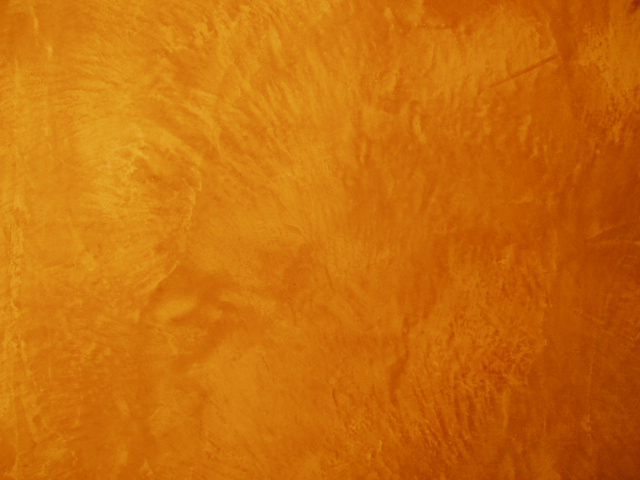 Echantillon stuc à la chaux dit "stuc Marmorino".